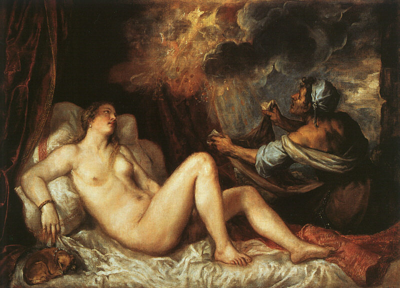 La obra representa a Dánae desnuda en su lecho y recibiendo a Zeus, que apareció en forma de lluvia de oro y la dejó embarazada.